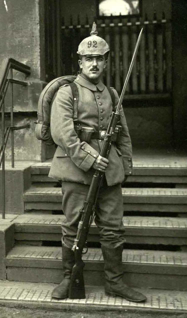 Braunschweig, Erster Weltkrieg: Soldat des Braunschweigischen Infanterie-Regiments Nr. 92, undatierte Feldpostkarte (vor 1919).